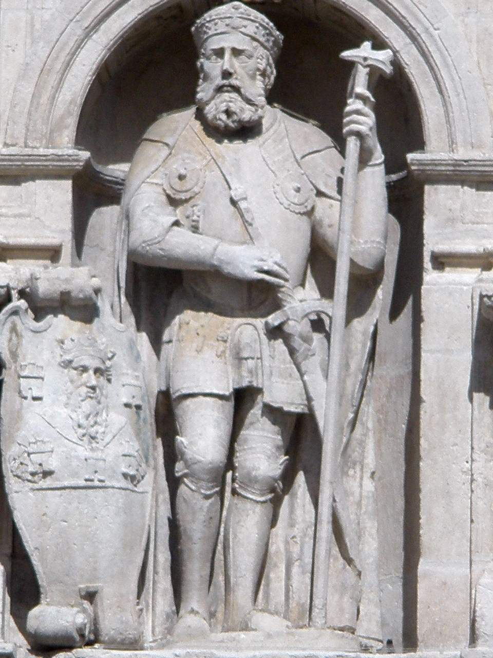 Burgos - Arco de Santa Maria - Diego Porcelos